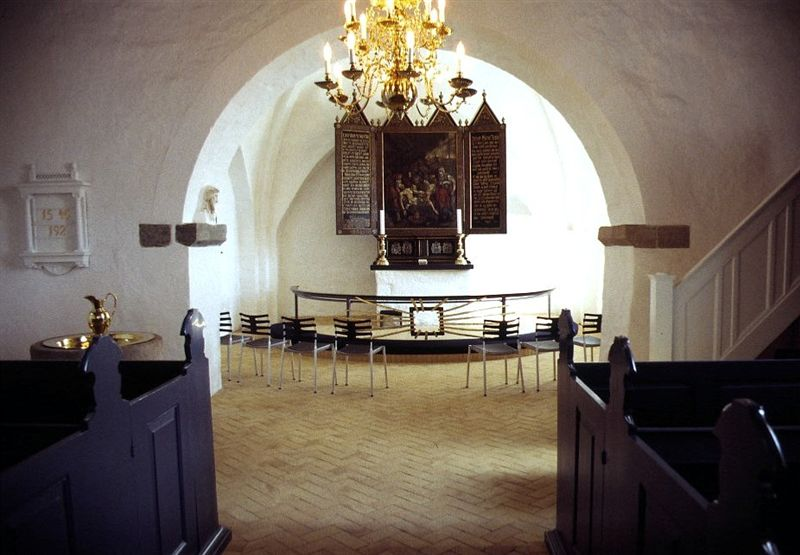 Bislev Kirke, Aalborg Kommune, kor